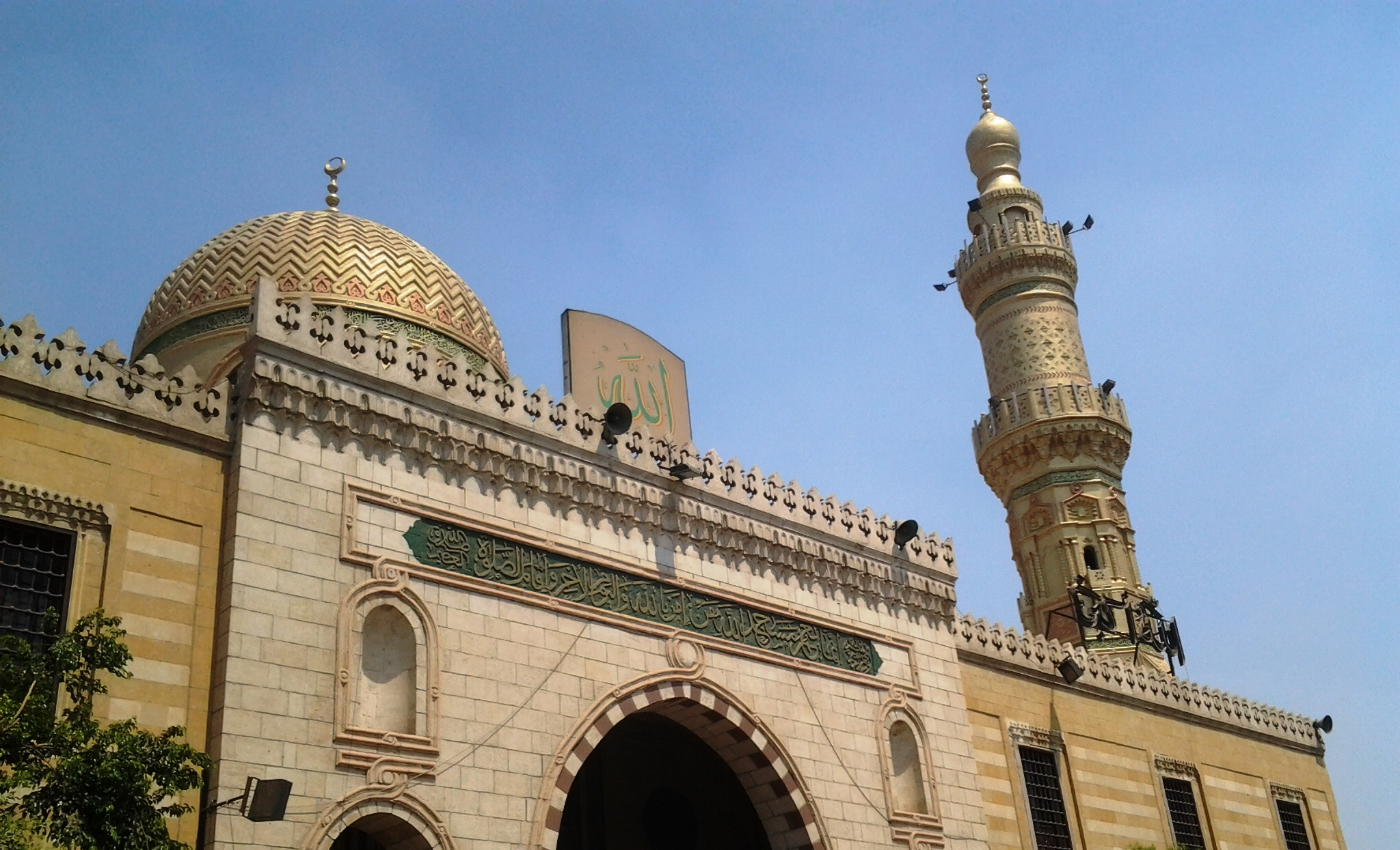 مسجد السيدة نفيسة من الخارج بالمئذنة كاملة